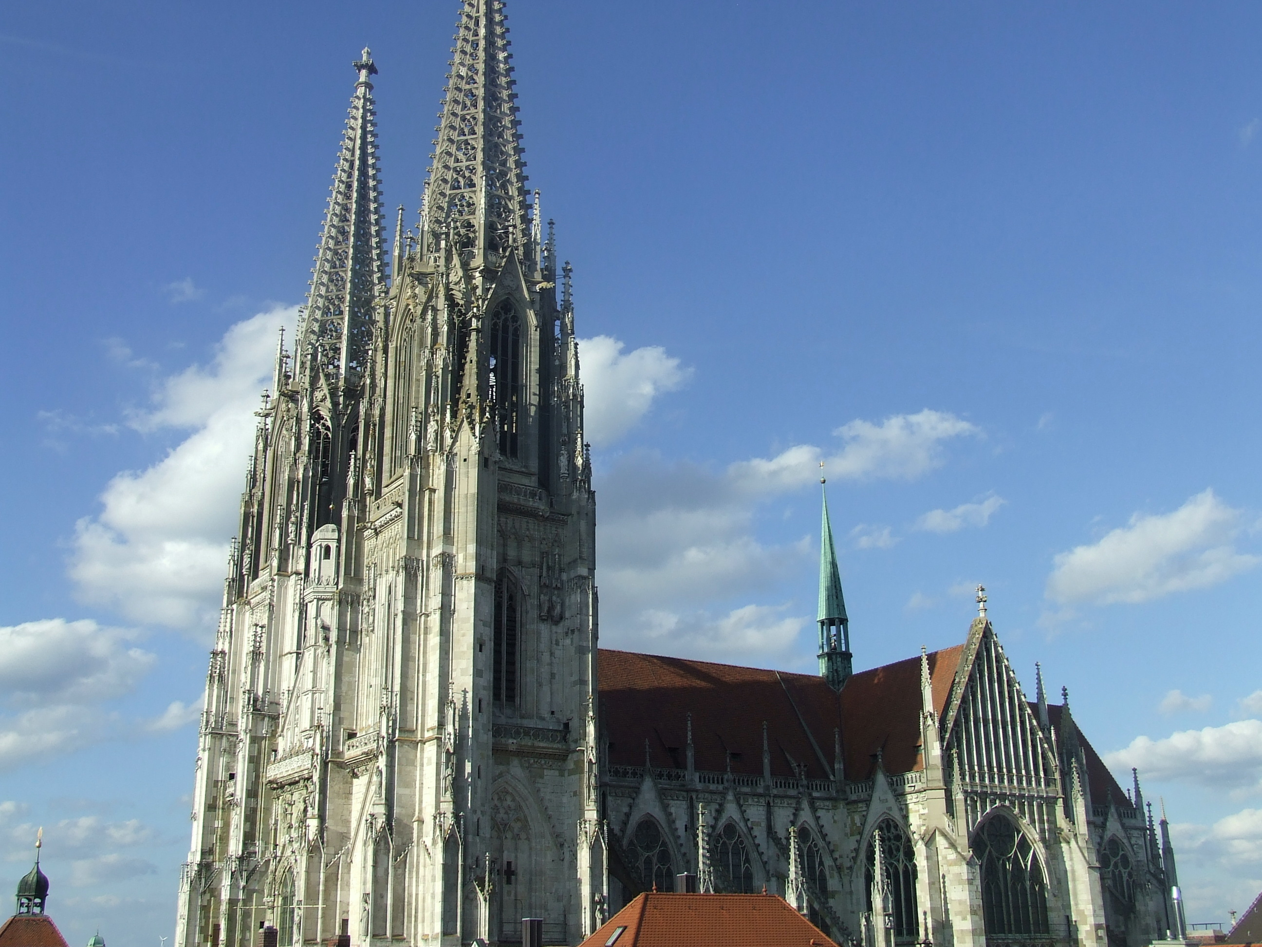 Dom St. Peter in Regensburg